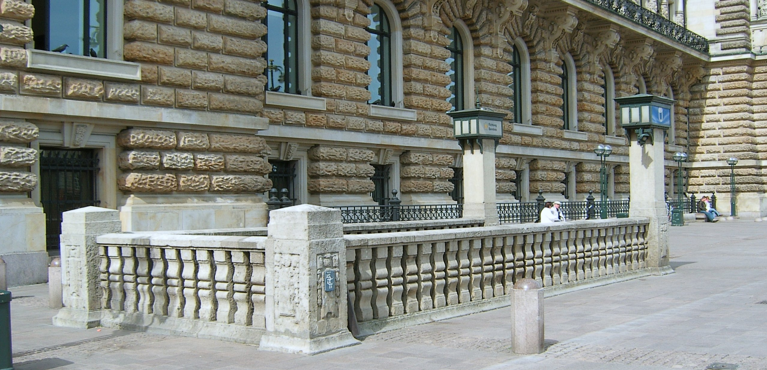 Eingang der U-Bahnstation „Rathaus“ in Hamburg-Altstadt